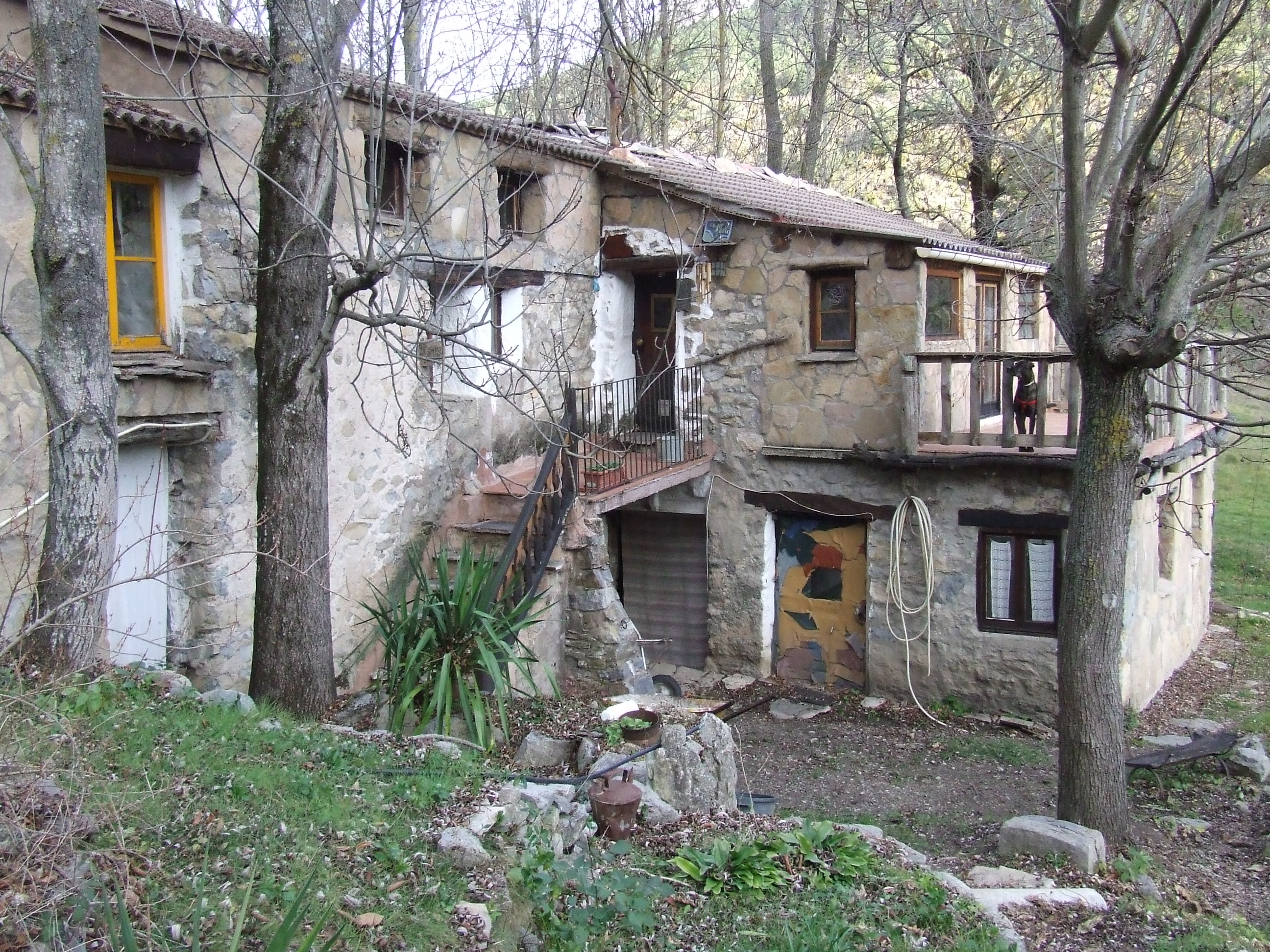 El Molí de Bóixols (Abella de la Conca, Pallars Jussà)